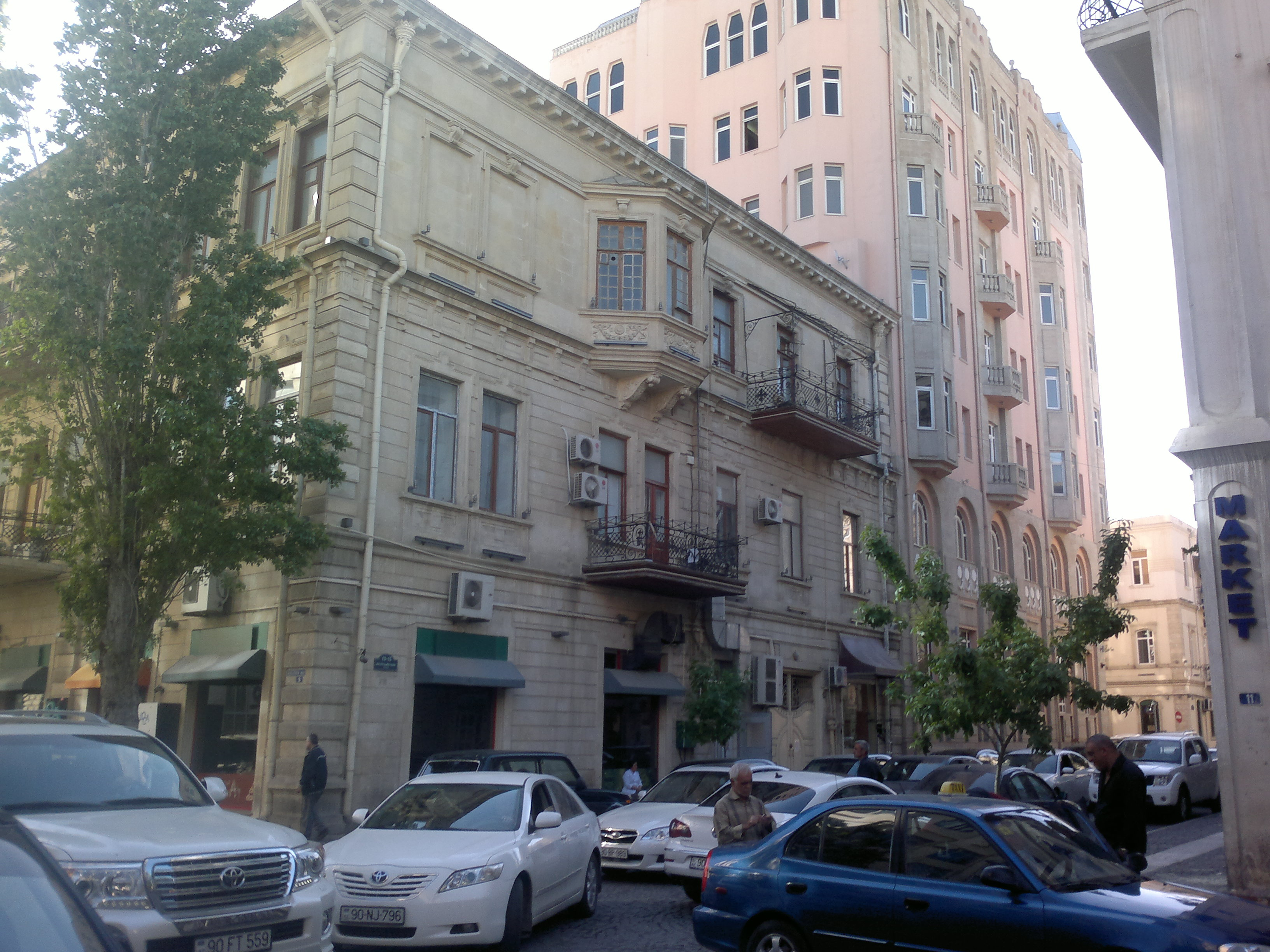 Building on 13 Tarlan Aliyarbayov Street. Bulit in 1887.